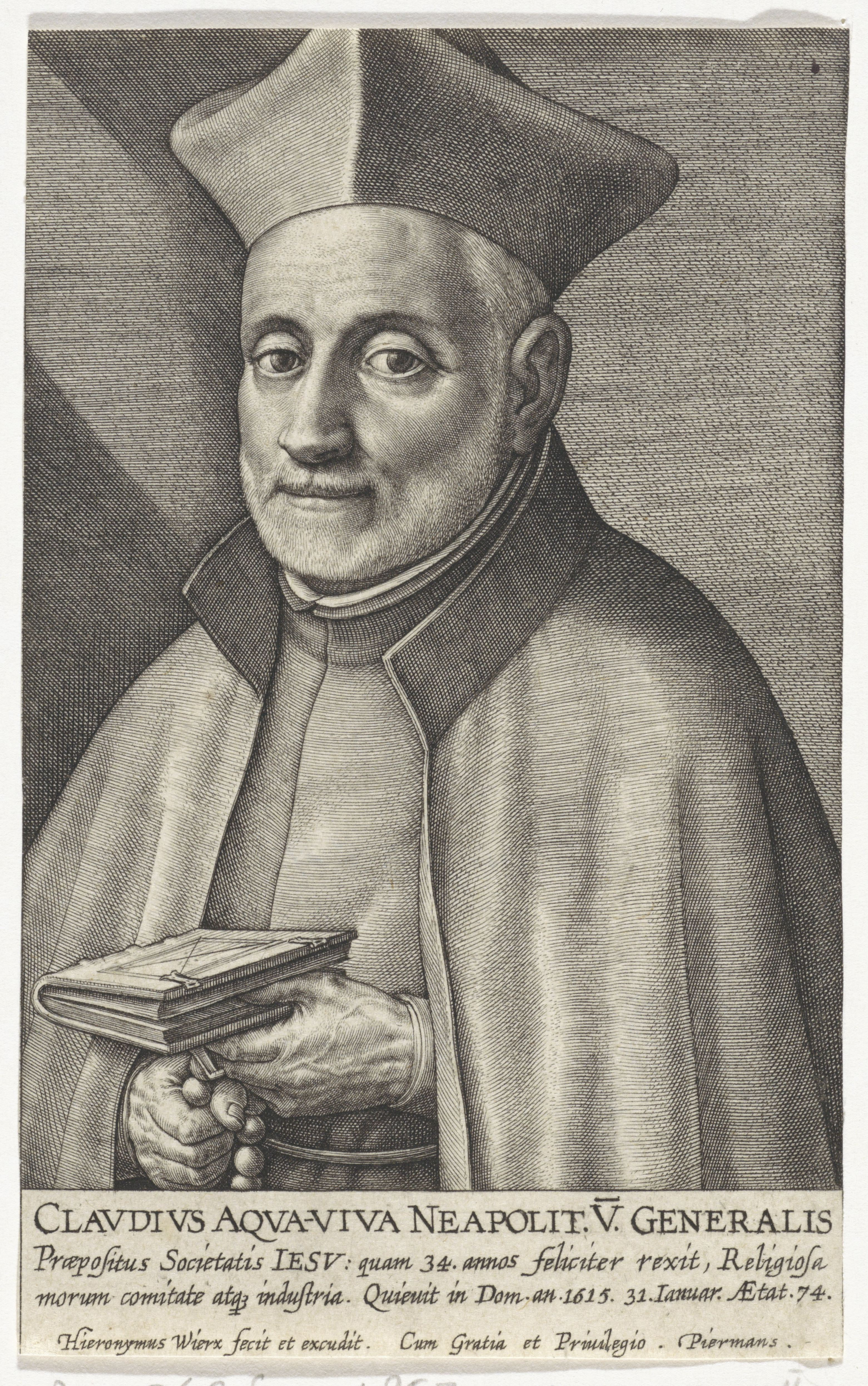 IdentificatieTitel(s): Portret van de jezuïet Claudius AquavivaPortretten van generaal oversten van de jezuïeten (serietitel)Effigies præpositorvm generalivm societatis Iesv (serietitel)Objecttype: prent Objectnummer: RP-P-1909-1354Catalogusreferentie: Hollstein Dutch 2019-2(2)Opschriften / Merken: verzamelaarsmerk, verso, gestempeld: Lugt 2228Omschrijving: Portret van de jezuïet Claudius Aquaviva, in zijn handen een bijbel en een rozenkrans. In de marge een drieregelig onderschrift in het Latijn.VervaardigingVervaardiger: prentmaker: Hieronymus Wie: rix (vermeld op object)uitgever: Hieronymus Wierix (vermeld op object)verlener van privilege: Piermans (vermeld op object)Plaats vervaardiging: AntwerpenDatering: 1615 - 1619Fysieke kenmerken: gravureMateriaal: papier Techniek: graveren (drukprocedé)Afmetingen: blad: h 116 mm × b 72 mmOnderwerpWat: the Bible as a bookaids for prayer, e.g. rosaryWieClaudius AquavivaVerwerving en rechtenVerwerving: aankoop 1909Copyright: Publiek domein